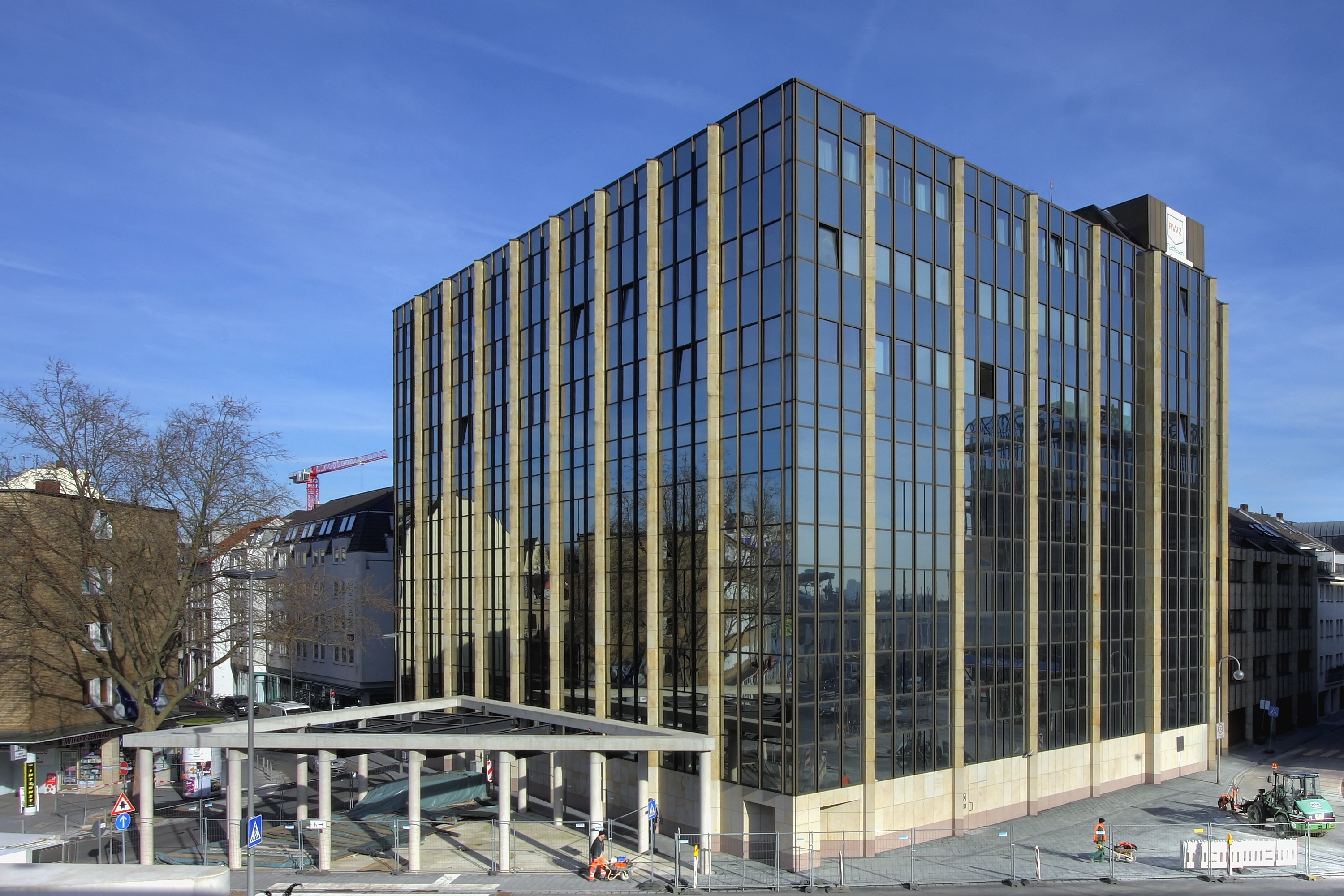 Raiffeisen Waren-Zentrale Rhein-Main (kurz RWZ Rhein-Main eG), Altenberger Straße 1a, 50668 Köln. Das aufgeständerte Dreieck links im Vordergrund ist der neue Eingang zur Stadtbahn-Haltestelle Breslauer Platz